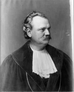 Portrait von Johann Säxinger (1835-1897), Medizinprofessor (Geburtshilfe und Gynäkologie). Bezeichnung: „Joh. Säxinger. / Fac. med. / nat. 1836 / pict. 1897“ (Rahmenschild) „Johann Säxinger / Med. Fak. Zürich“ (Leinwandrückseite). Größe: Bild: 74,3 cm x 59,8 cm; Rahmen: 90 cm x 76 cm